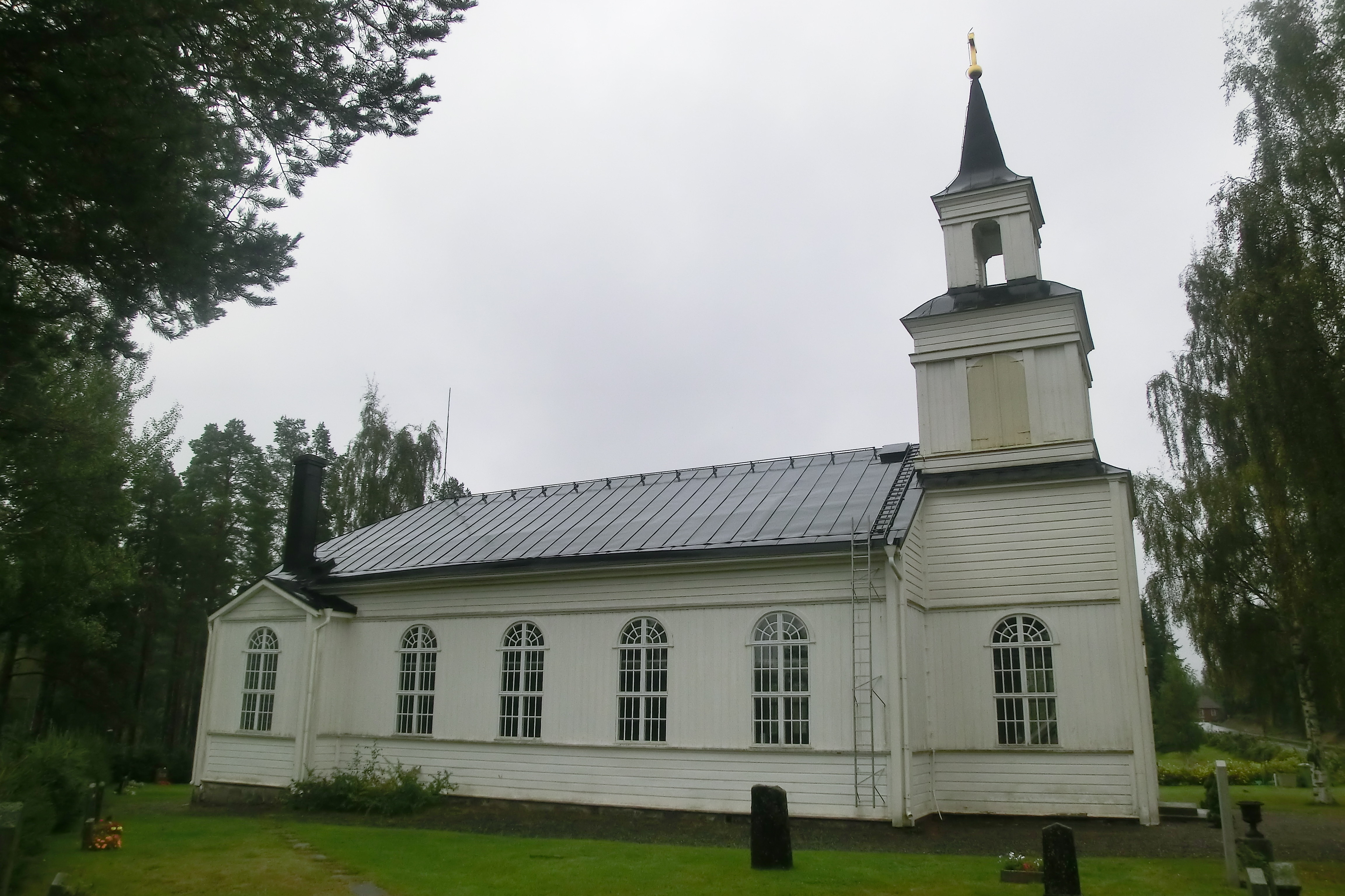 Hemsö kyrka